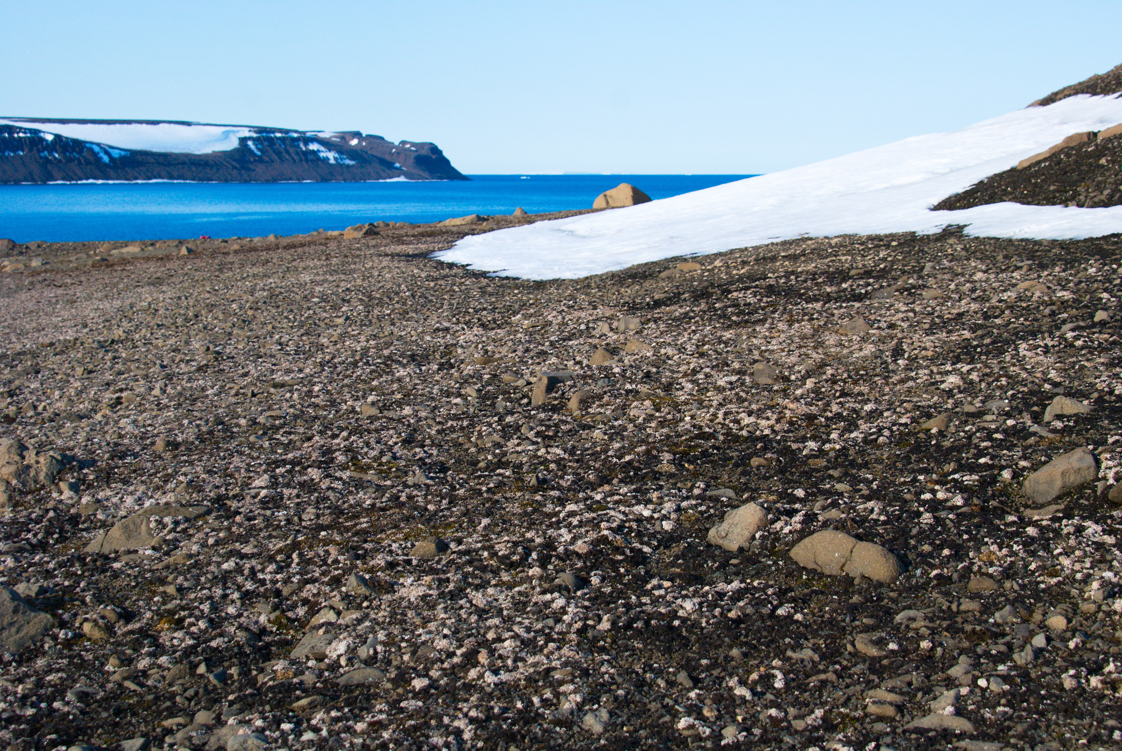 Залив Географов, о. Георга, Земля Франца-Иосифа